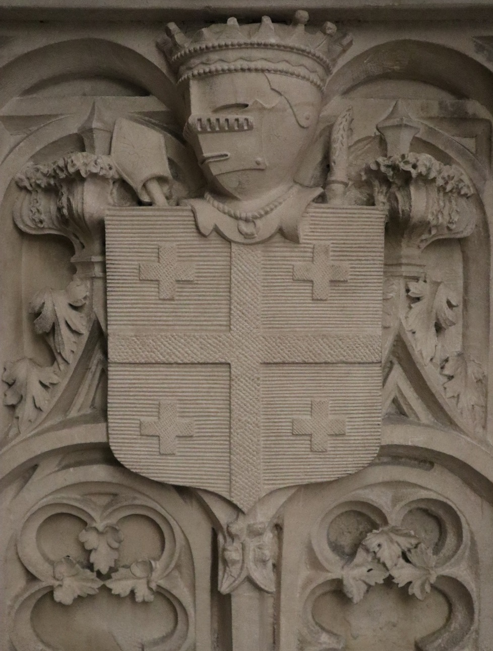 Tombe de Mgr Jean-François Croizier (1787-1855) évêque de Rodez (1842-1855). Armoiries du Prélat.